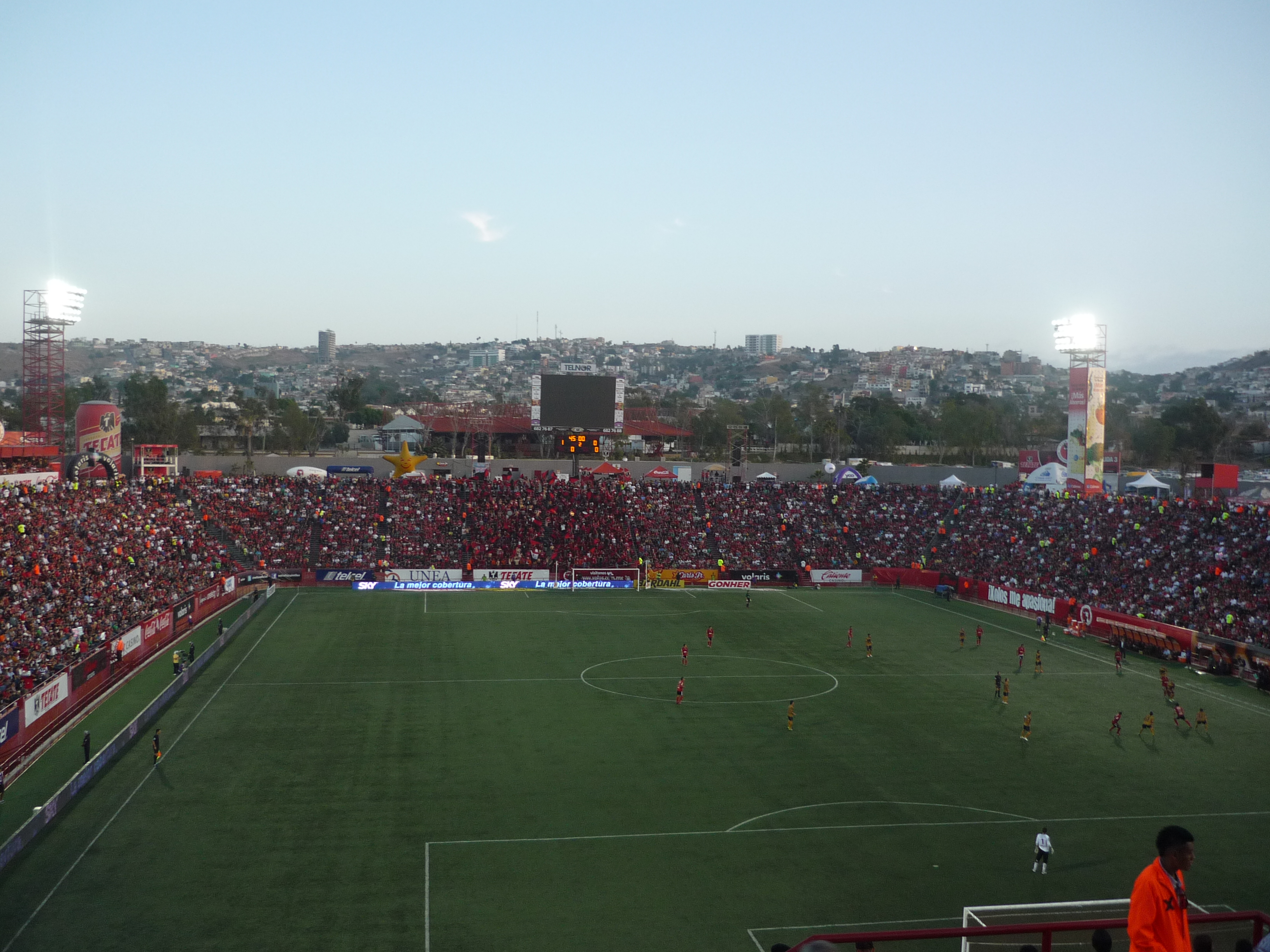 Iluminacion estadio caliente